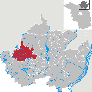 Boitzenburger Land in Brandenburg (Country) - District Uckermark